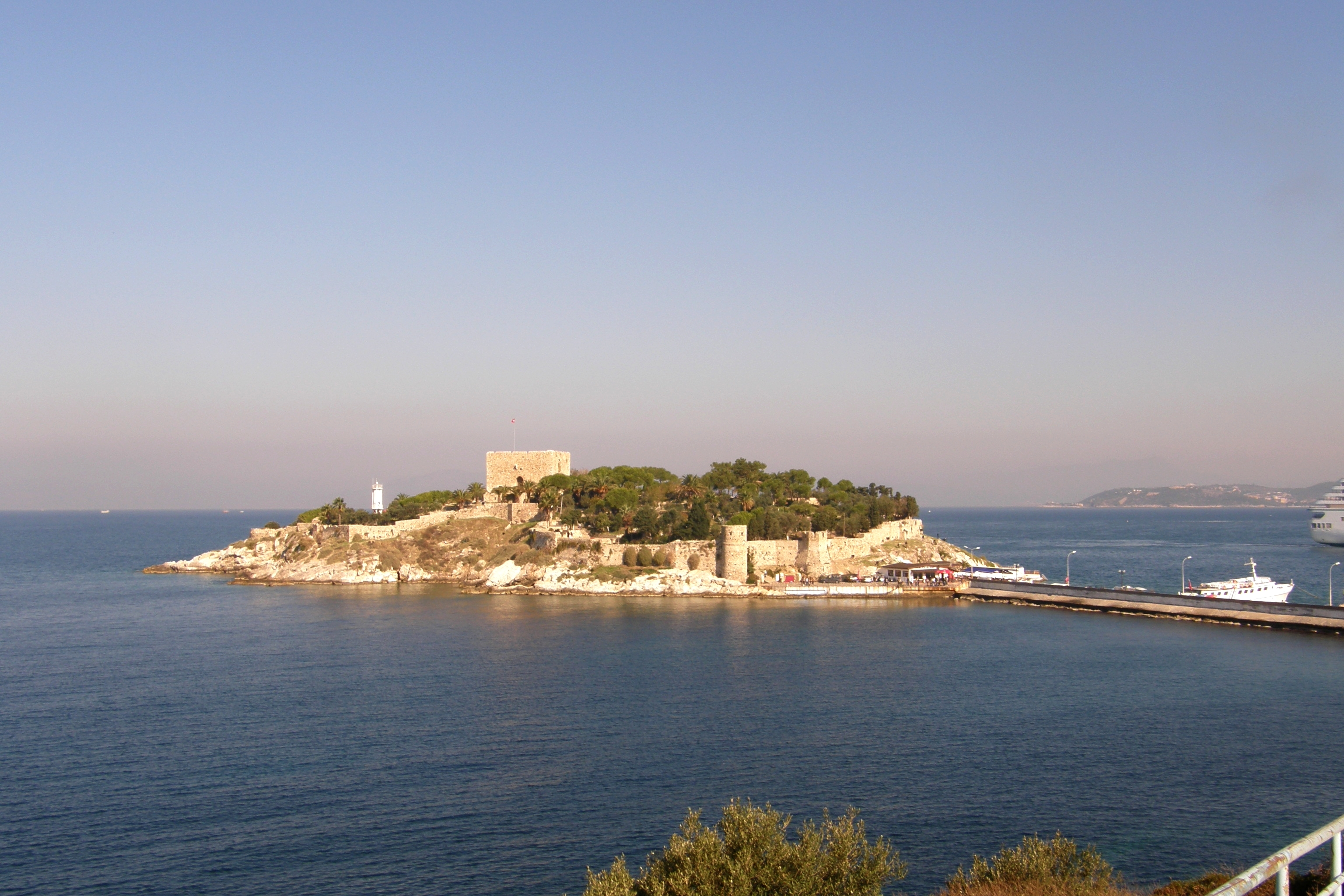 Le fort de Kuşadası, province d'Aydin, région d'Égée, Turquie. Photo prise de Güvercinada Cadesi